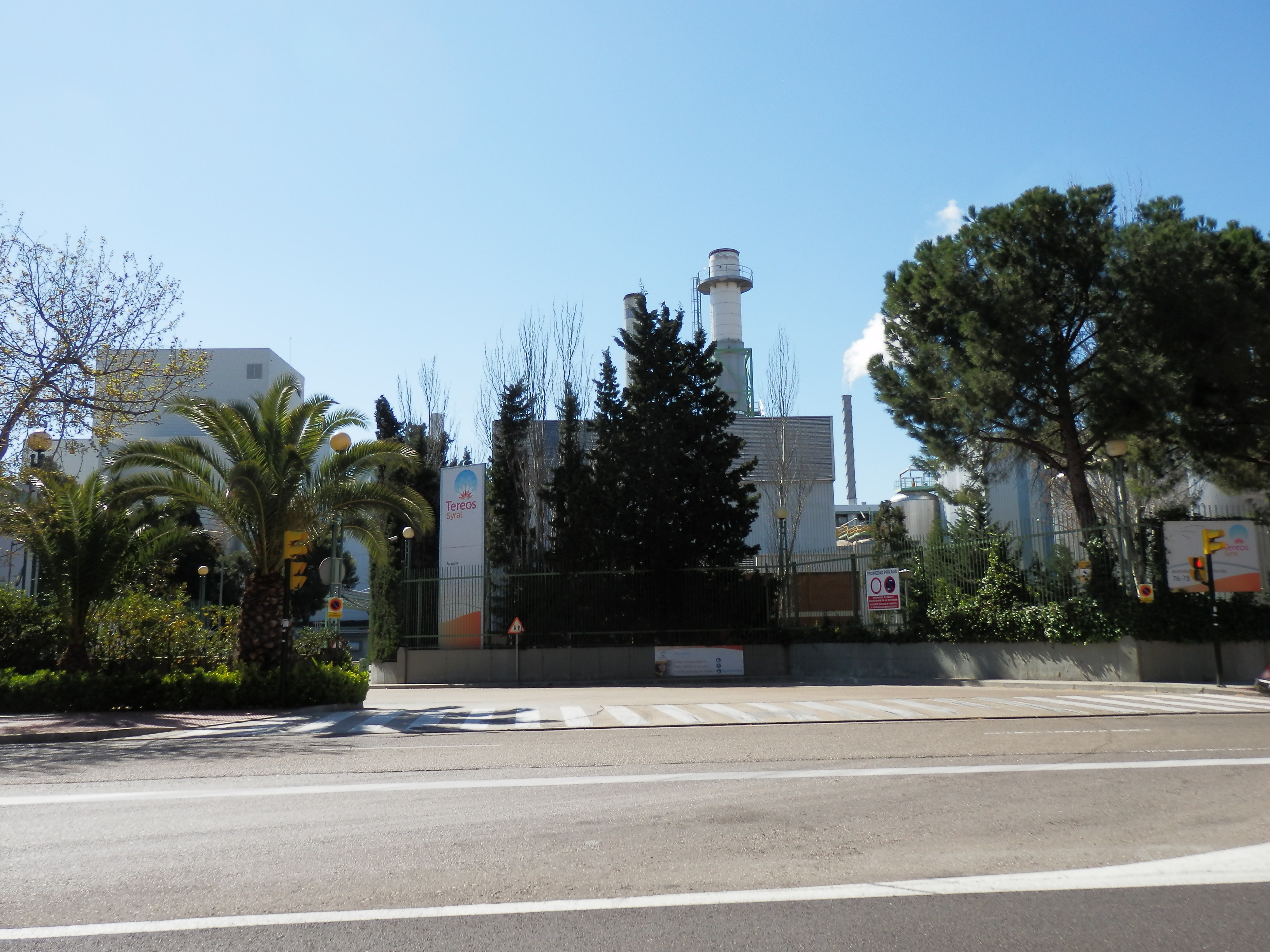 Factoría de Tereos Syral en Zaragoza.